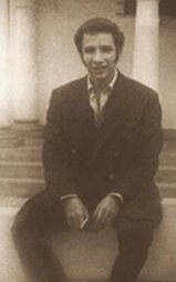 Luis Hernandez en la década de 1970. Lima - Perú.